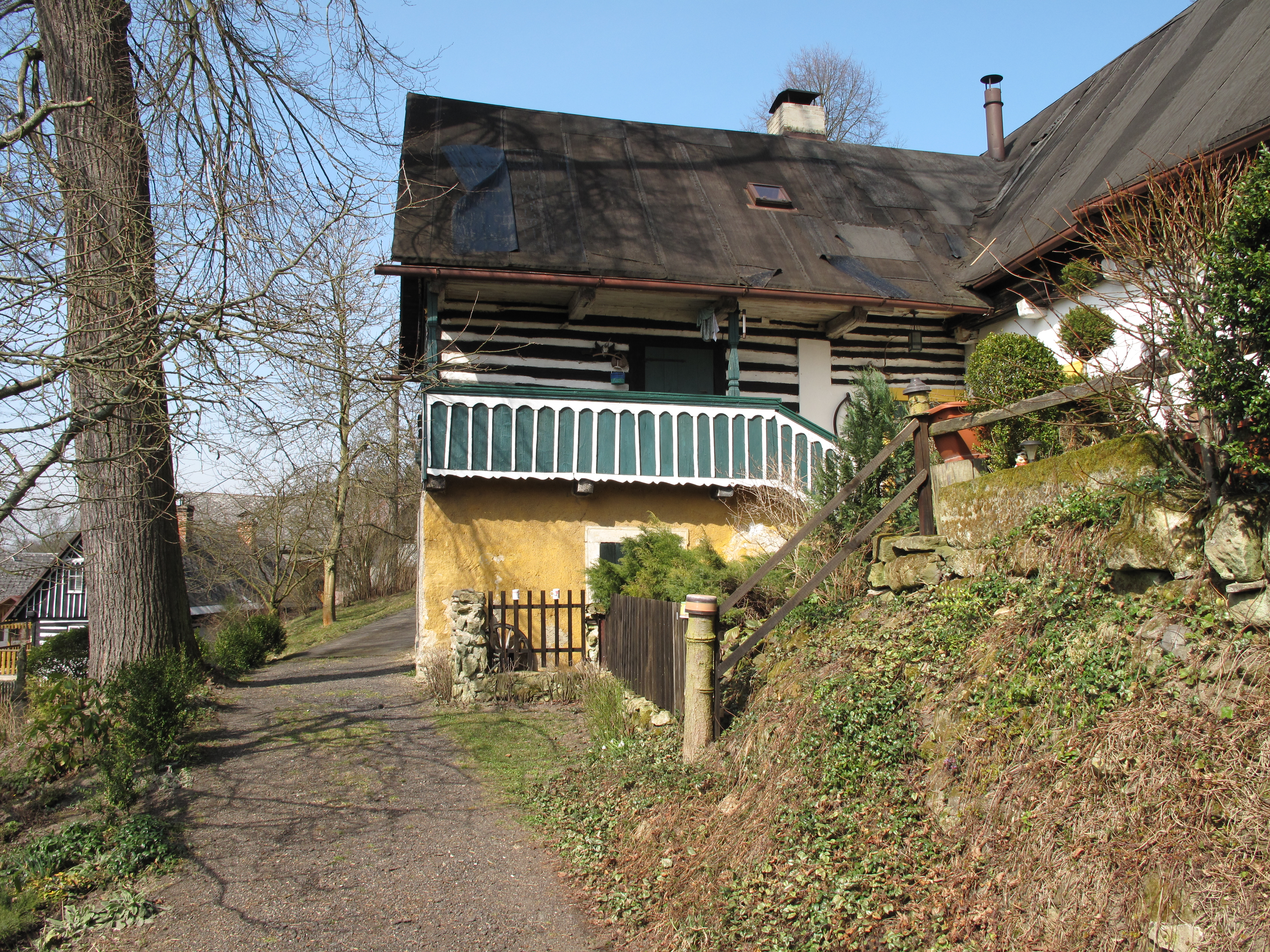 Roubenka v Cetenově. Okres Liberec, Česká republika.